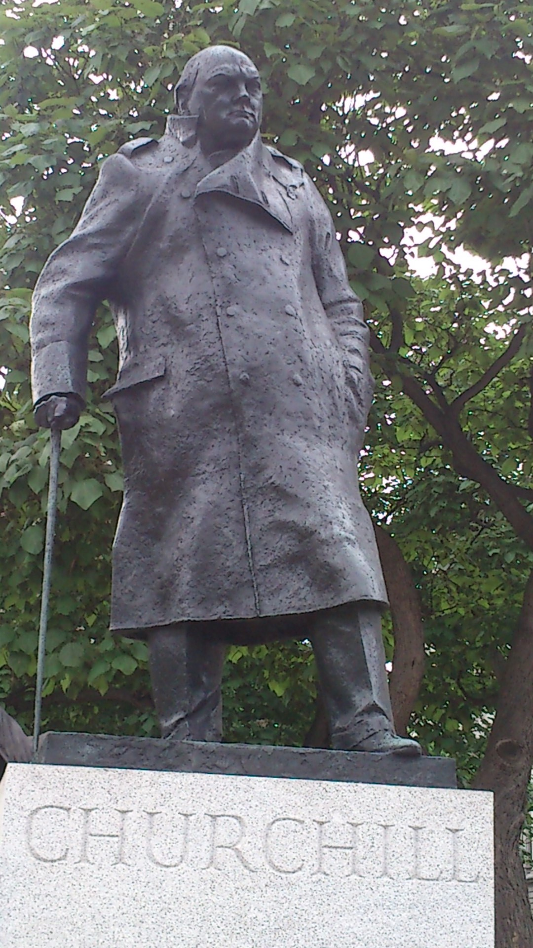 Statue de Winston Churchill en face de l'abbaye de Westminster